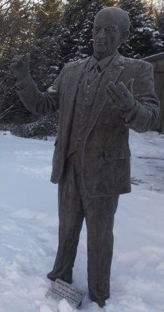 Statue von Hermann Grote in Hohegeiß vor dem Museuem "Alte Pfarre", Lange Str. 54, 38700 Braunlage